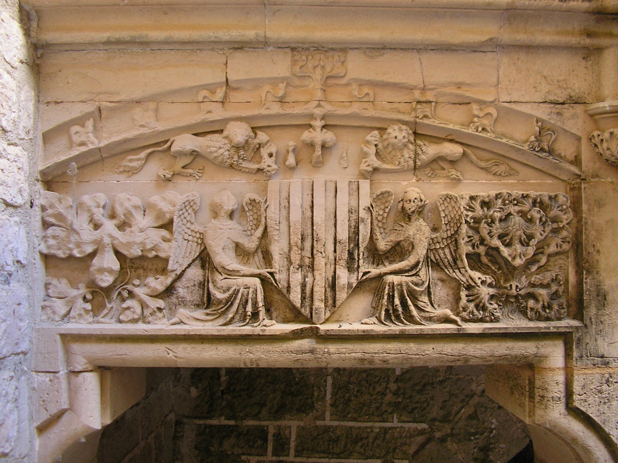 Real Monasterio de Santes Creus - Detalle Bajando Escalera